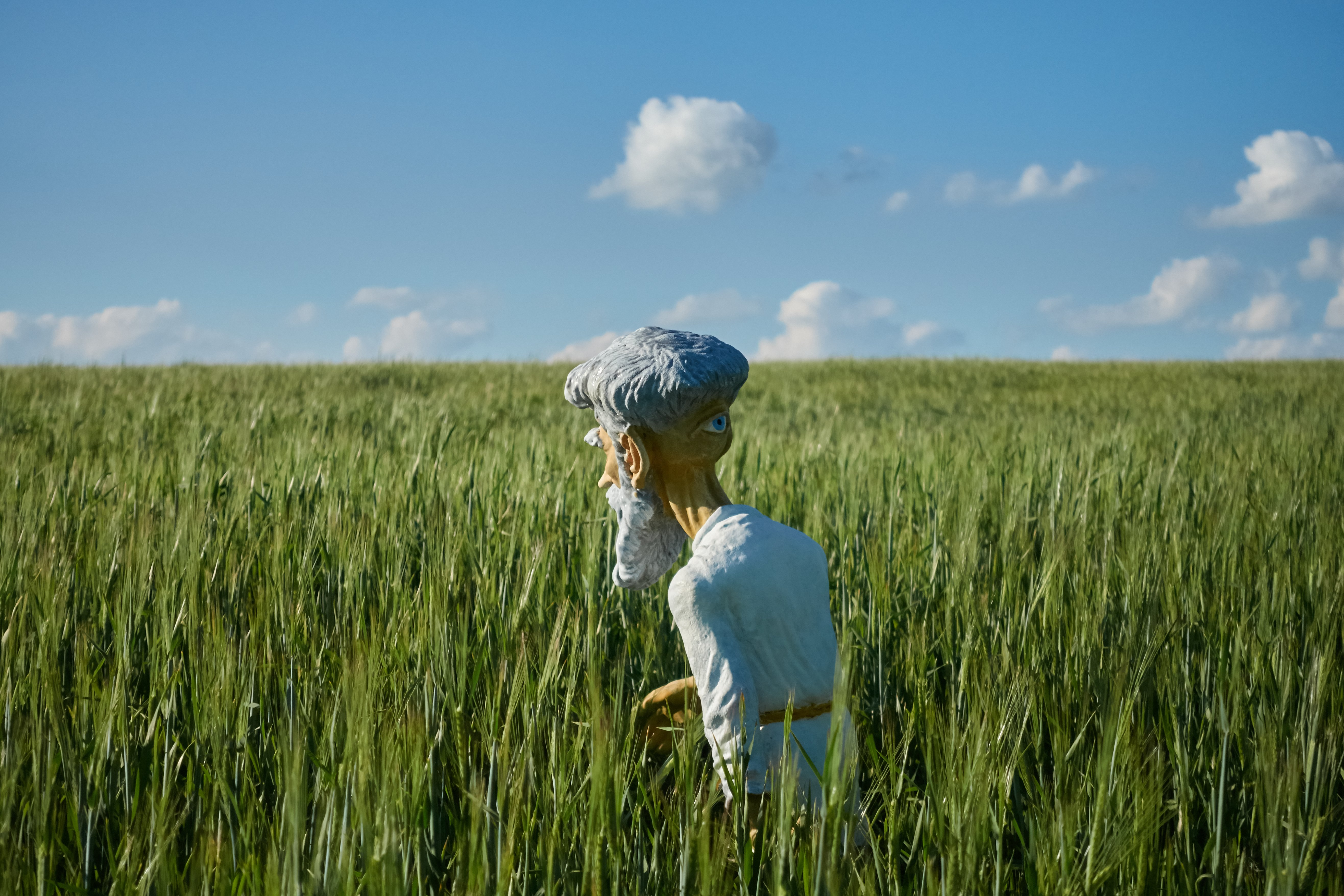 Житень (житный дед, белор. жыцень, жытні дзед) — дух, хозяин поля у белорусов.